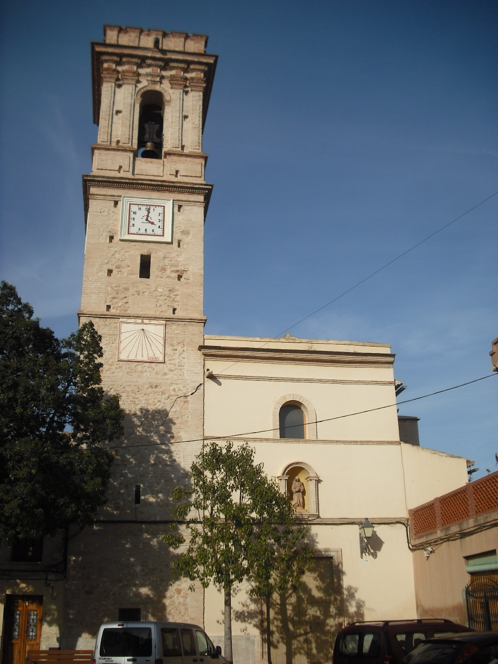 Església parroquial de Santa Maria Magdalena, a Benifaraig